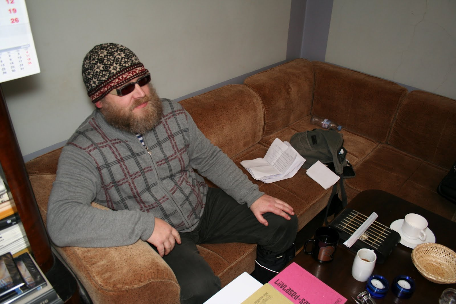 Kivisildnik Kulka kirjanduse sihtkapitali aastaauhinna nominendide tutvustusesinemisel Tartus.